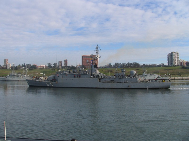 ARA Guerrico (P-32) Corbette